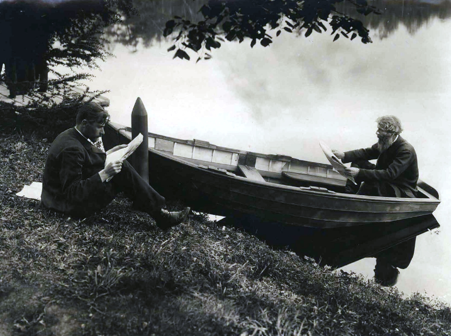 Депутаты 2-й Государственной думы Российской империи. Справа Кирносов Никита Савельевич